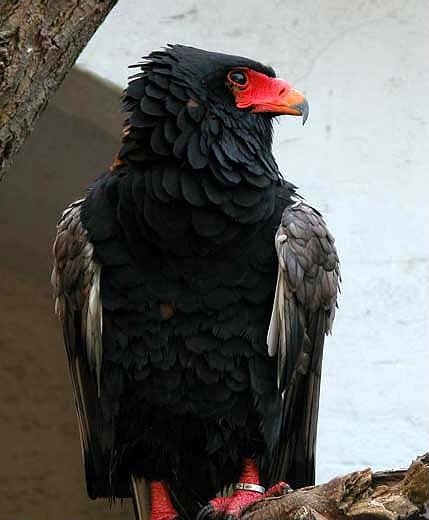 Gaukler (Terathopius ecaudatus)